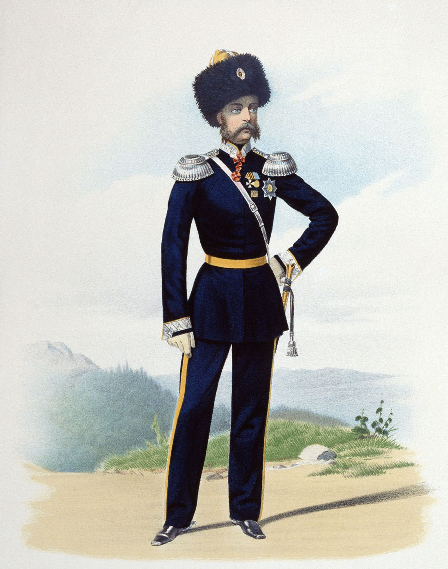 Генерал Астраханского Казачьего Войска, 28 августа 1862. (В городской воскресной форме).